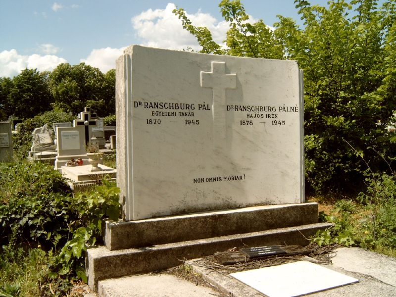 Ranschburg Pál sírja Budapesten. Új köztemető: 28-2-135/136.